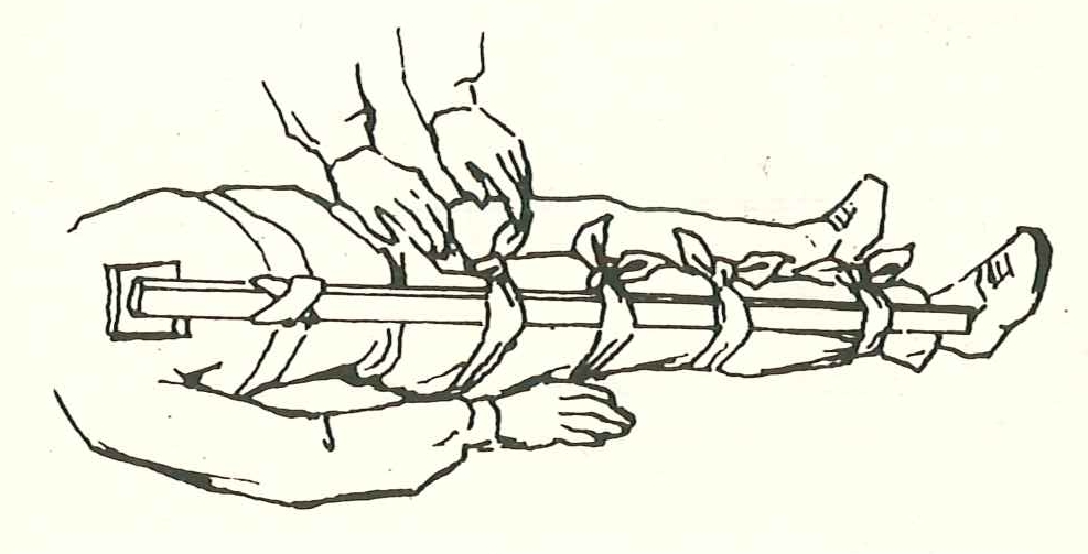 Beinschienung